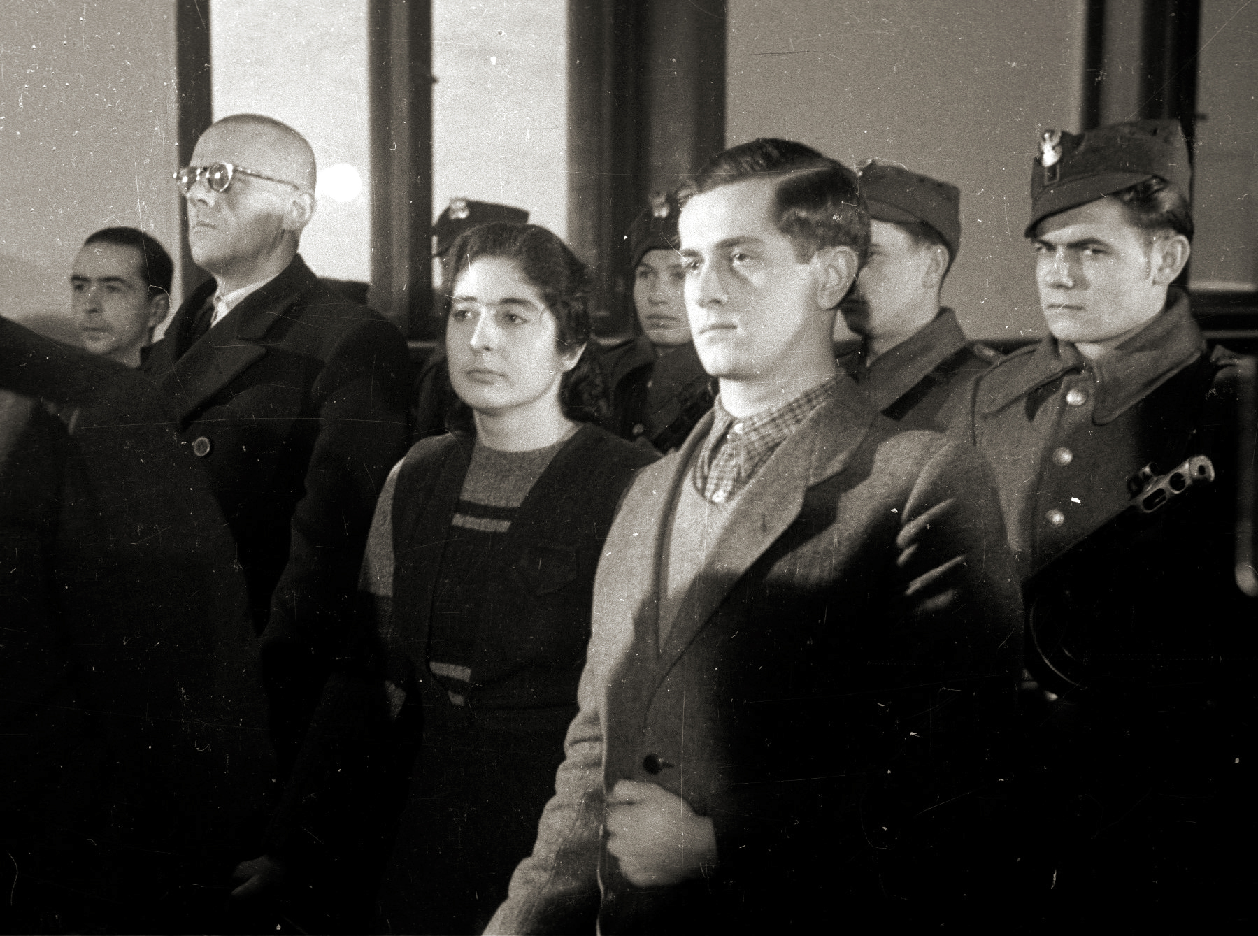 Warszawa, styczeń 1947. Proces członków Zrzeszenia Wolność i Niezawisłość oskarżonych o przekazywanie informacji ważnych dla bezpieczeństwa państwa ambasadorowi obcego mocarstwa. Na karę śmierci skazano Ksawerego hr. Grocholskiego, urzędnika MSZ Waldemara Baczaka i kapitana KBW Witolda Kalickiego. Krystynę Kosiorek skazano na karę więzienia. Na zdjęciu od lewej: Kalicki, Grocholski, Kosiorek i Baczak. bb/gr PAP